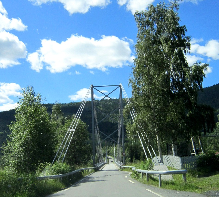 Einangsundet bru, Vestre Slidre (med fylkesvei 2476)